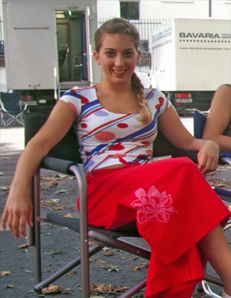 Nora Binder bei den Dreharbeiten zur vierten Staffel von „Mein Leben und ich“